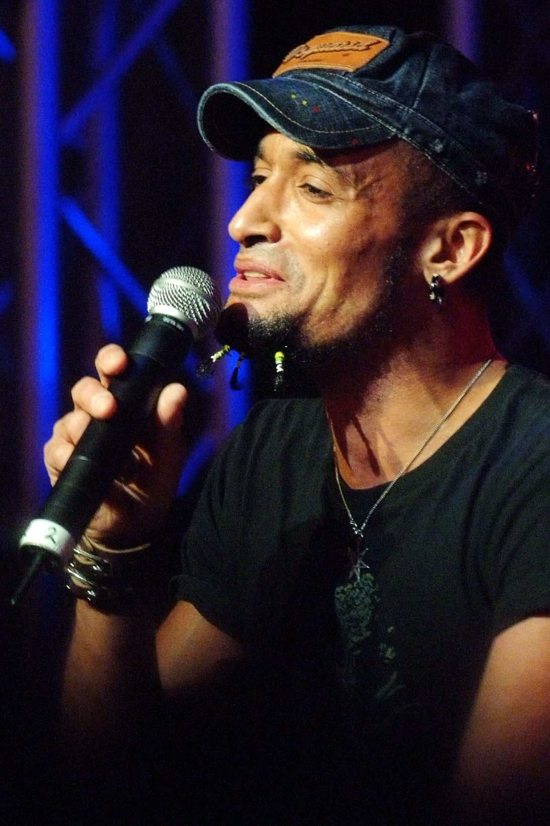 Mark Medlock: Kiels längste Nacht, Sophienhof, 24. Oktober 2009